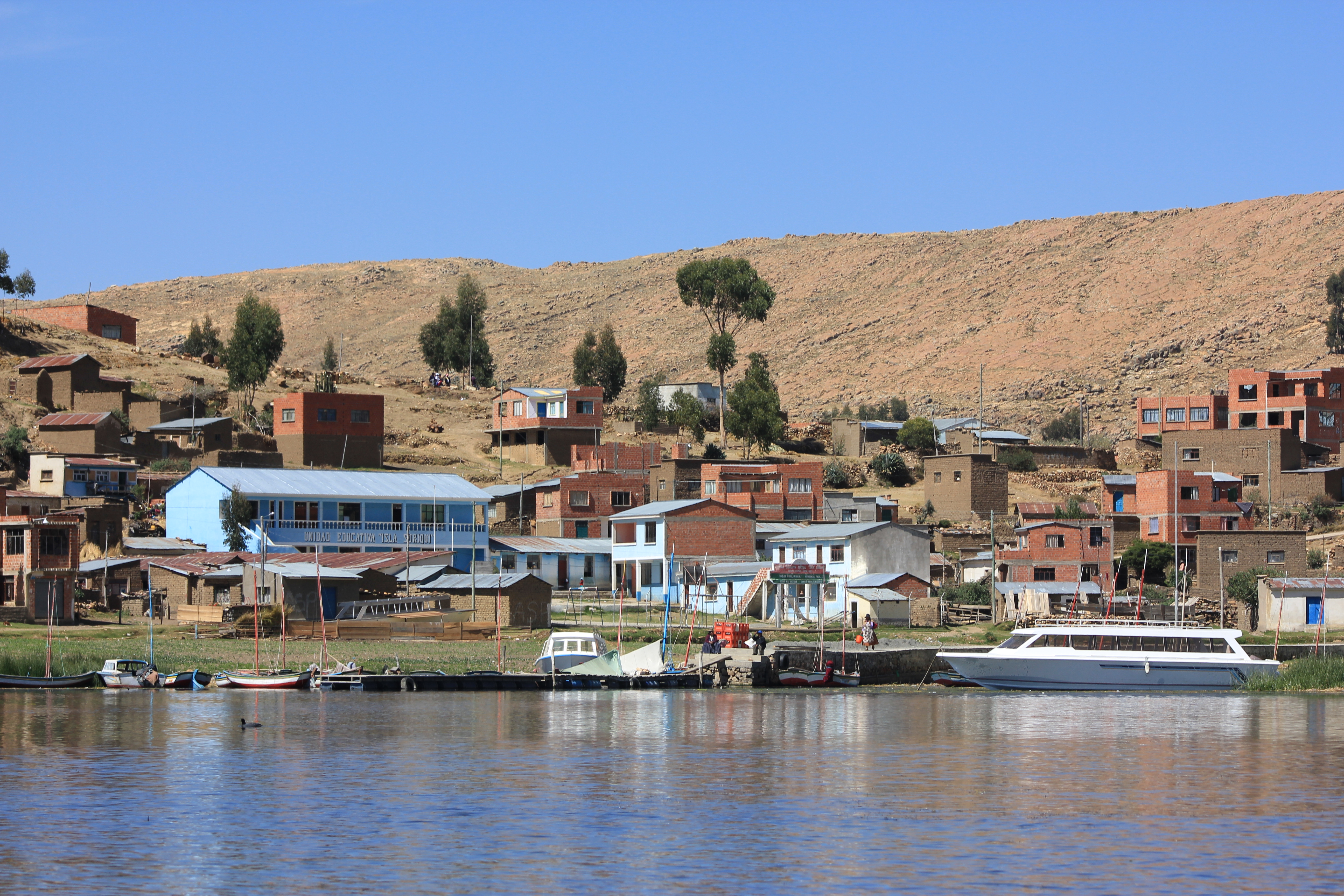 Isla Suriqui en el lago Titicaca